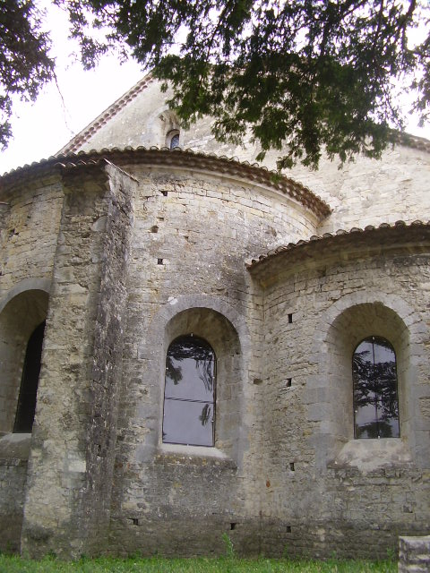 église de Saint-Marcel-lès-Sauzet (Drôme)